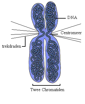 schematische weergave van twee chromatiden met spoeldraden.